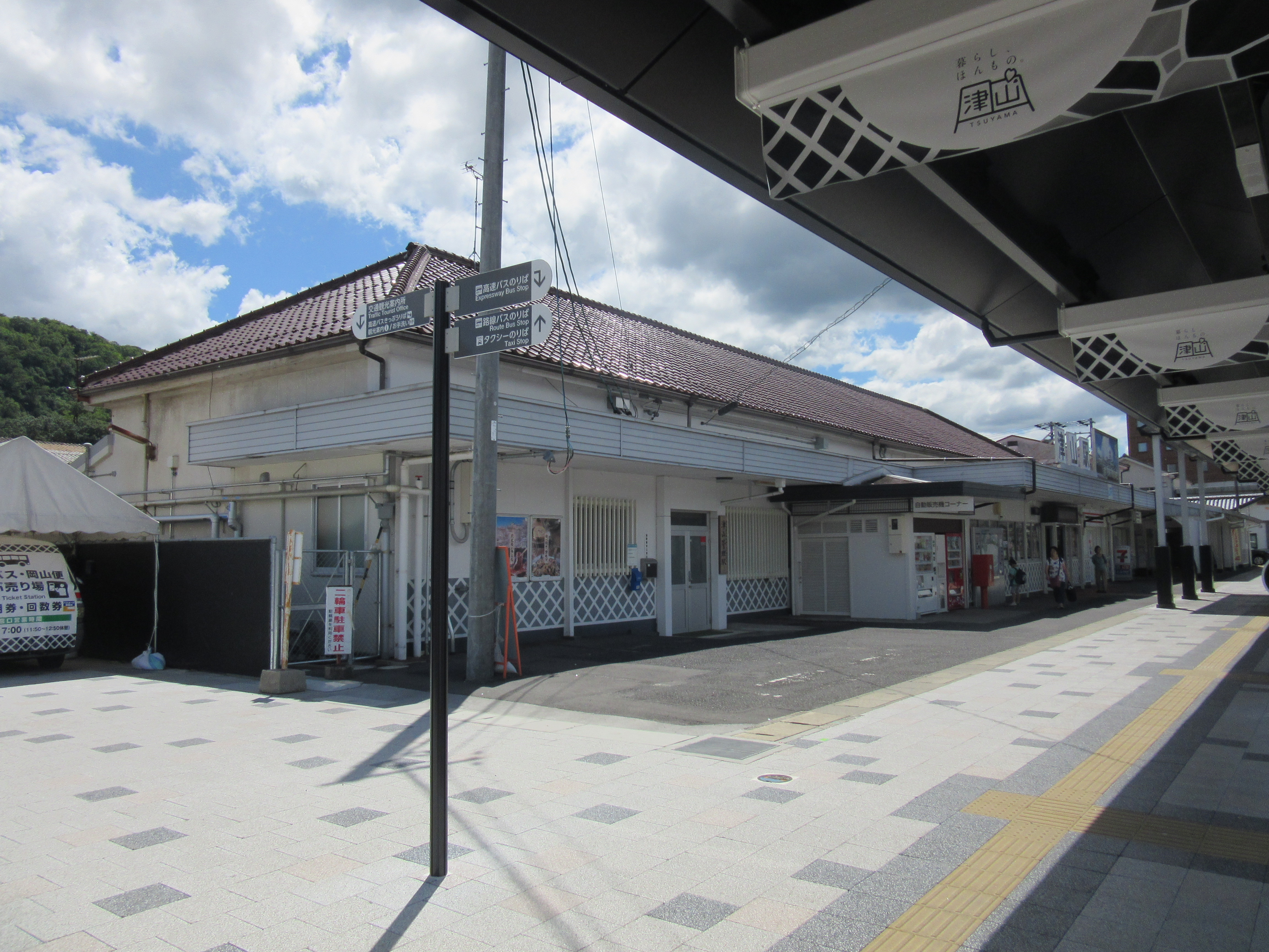 バス乗り場から見る津山駅舎